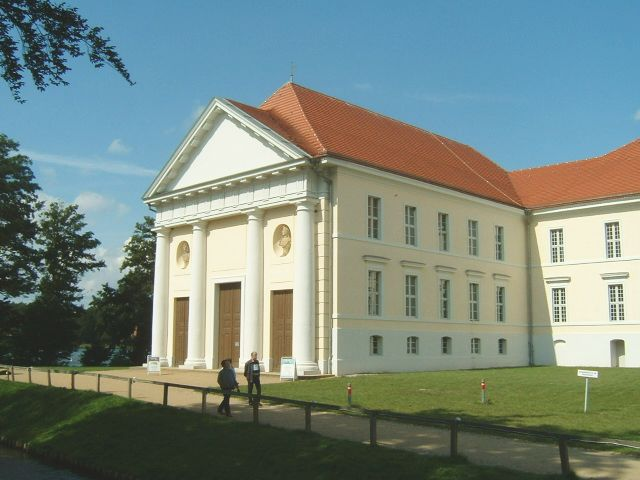 Schloßtheater Rheinsberg, rechts neben dem Schloß